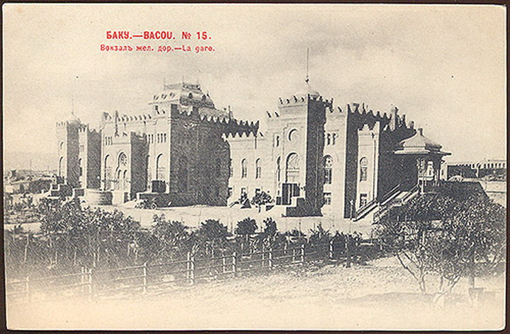 Бакинский вокзал